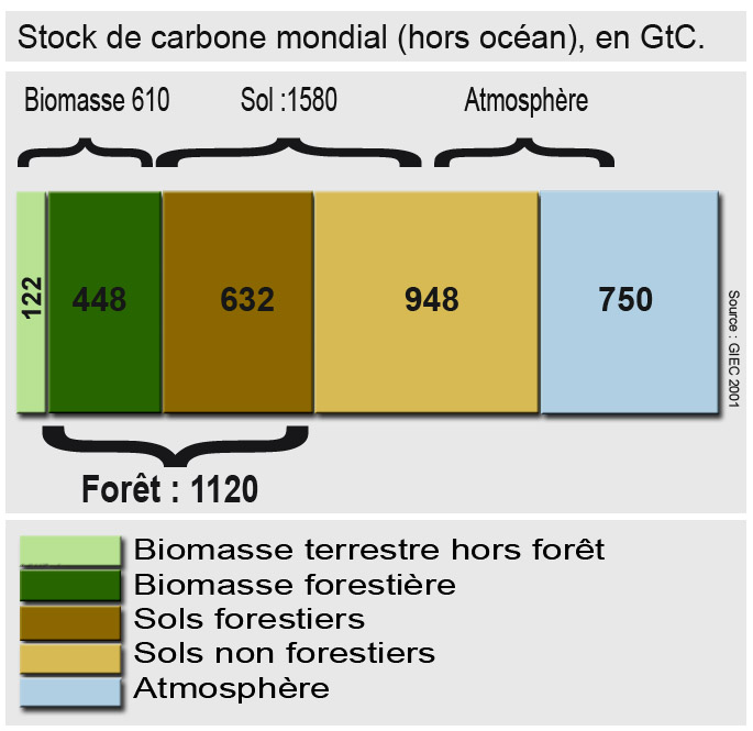 Stock de carbone mondial (hors océan), en GtC. Source données = GIEC (=Intergovernmental Panel on Climate Change =IPCC) 2001